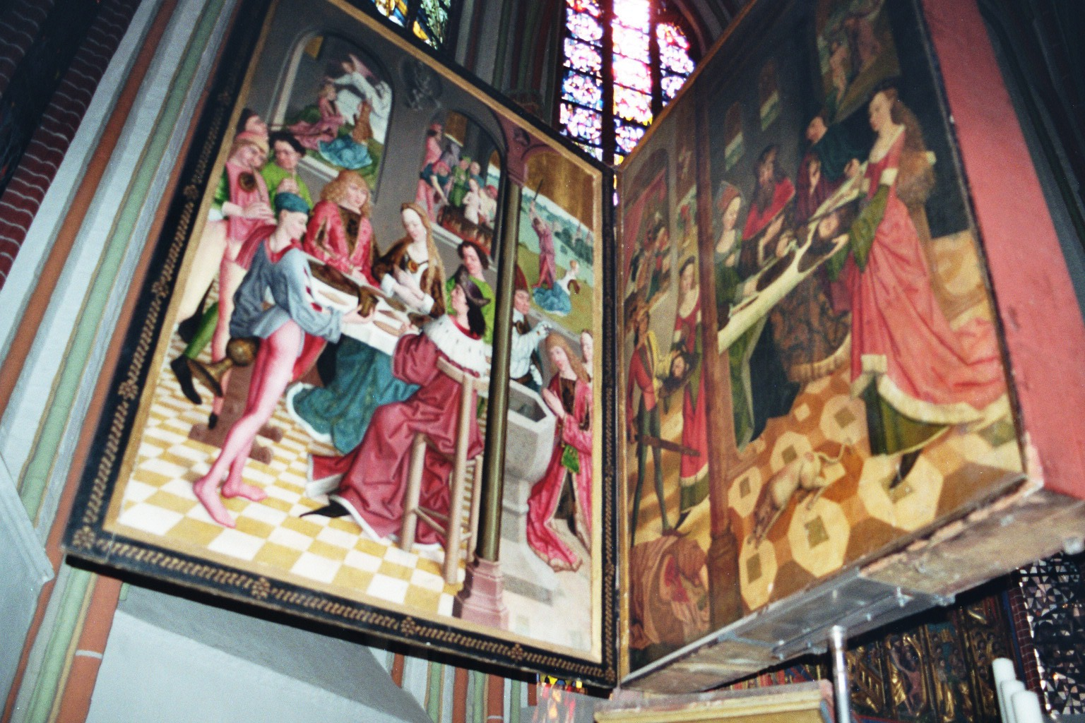 Lüneburg, St. Johannis, Hauptaltar, Tafeln von Hinrik Funhof, 1482–1484: links: Legende der hl. Cäcilie rechts: Geschichte des hl. Johannes des Täufers (von der Geburt bis zur Enthauptung)